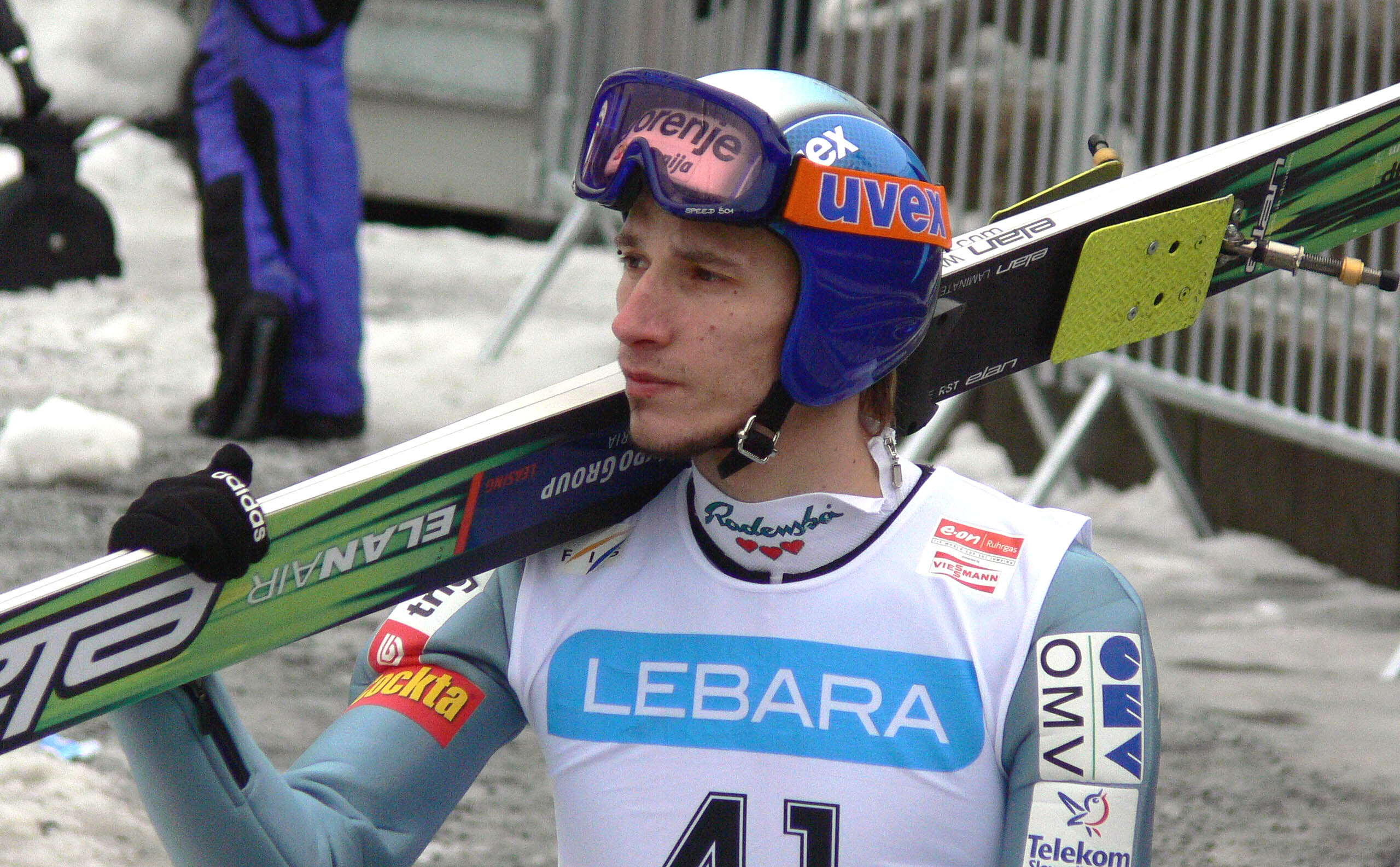 Robert Kranjec at the 2008 World Cup ski jumping event in Holmenkollen, Oslo.